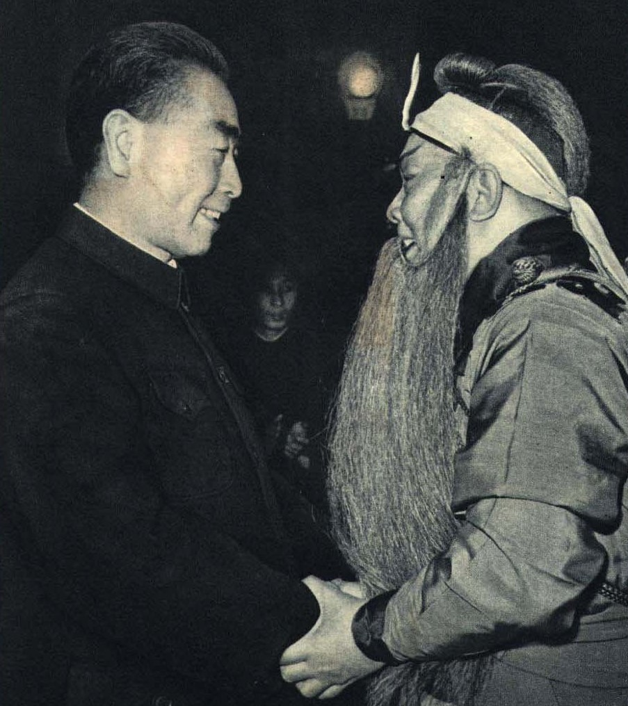 1962-03 1962年 周恩来与周信芳 打渔杀家